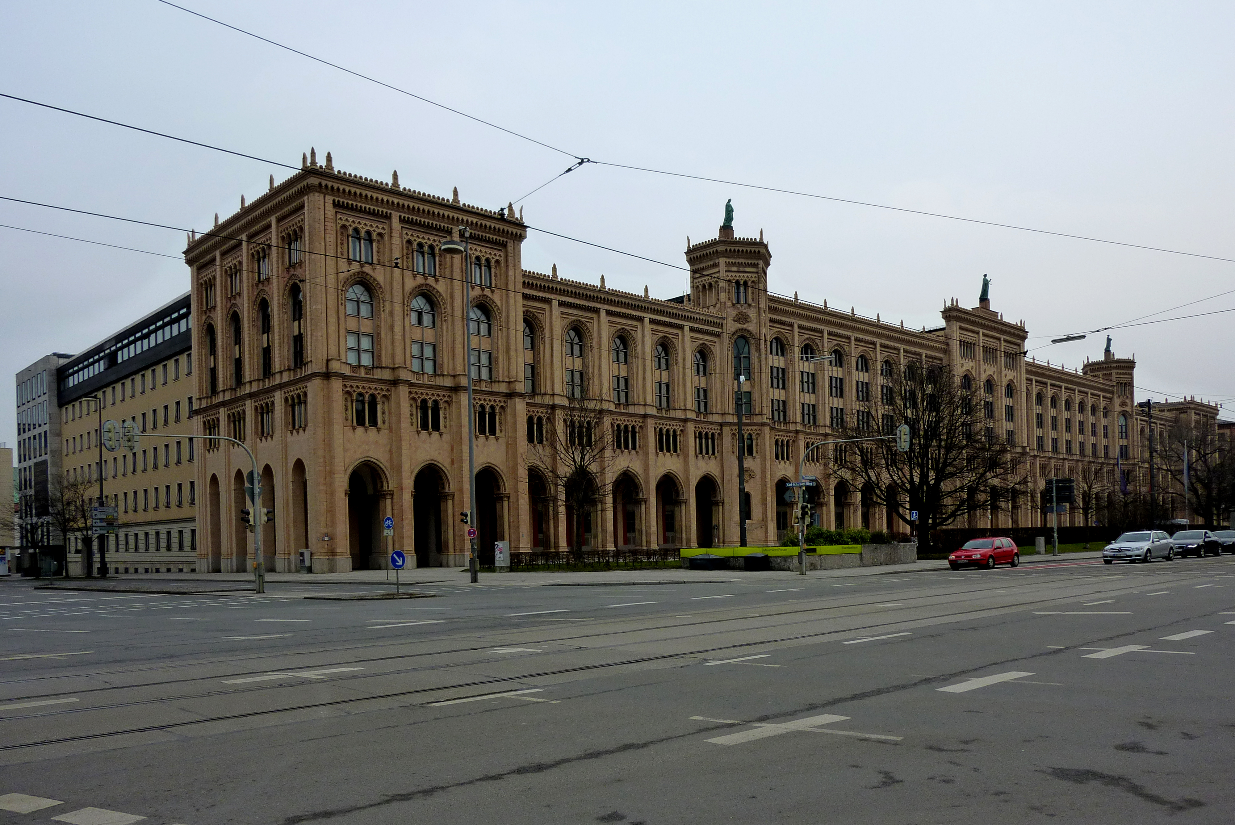 Maximilianstrasse historizáló épülete Münchenben